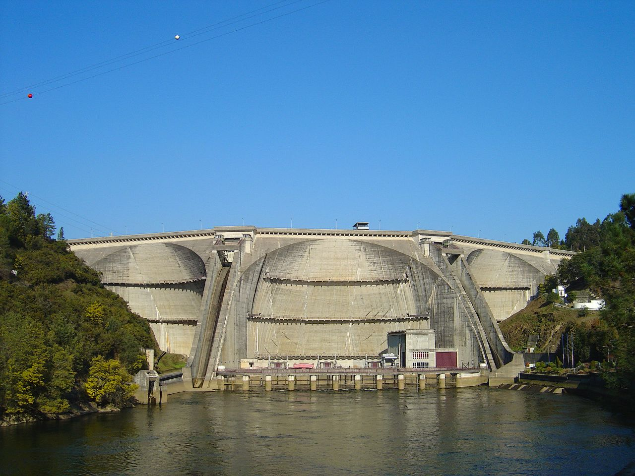 Barragem da Aguieira, Portugal.